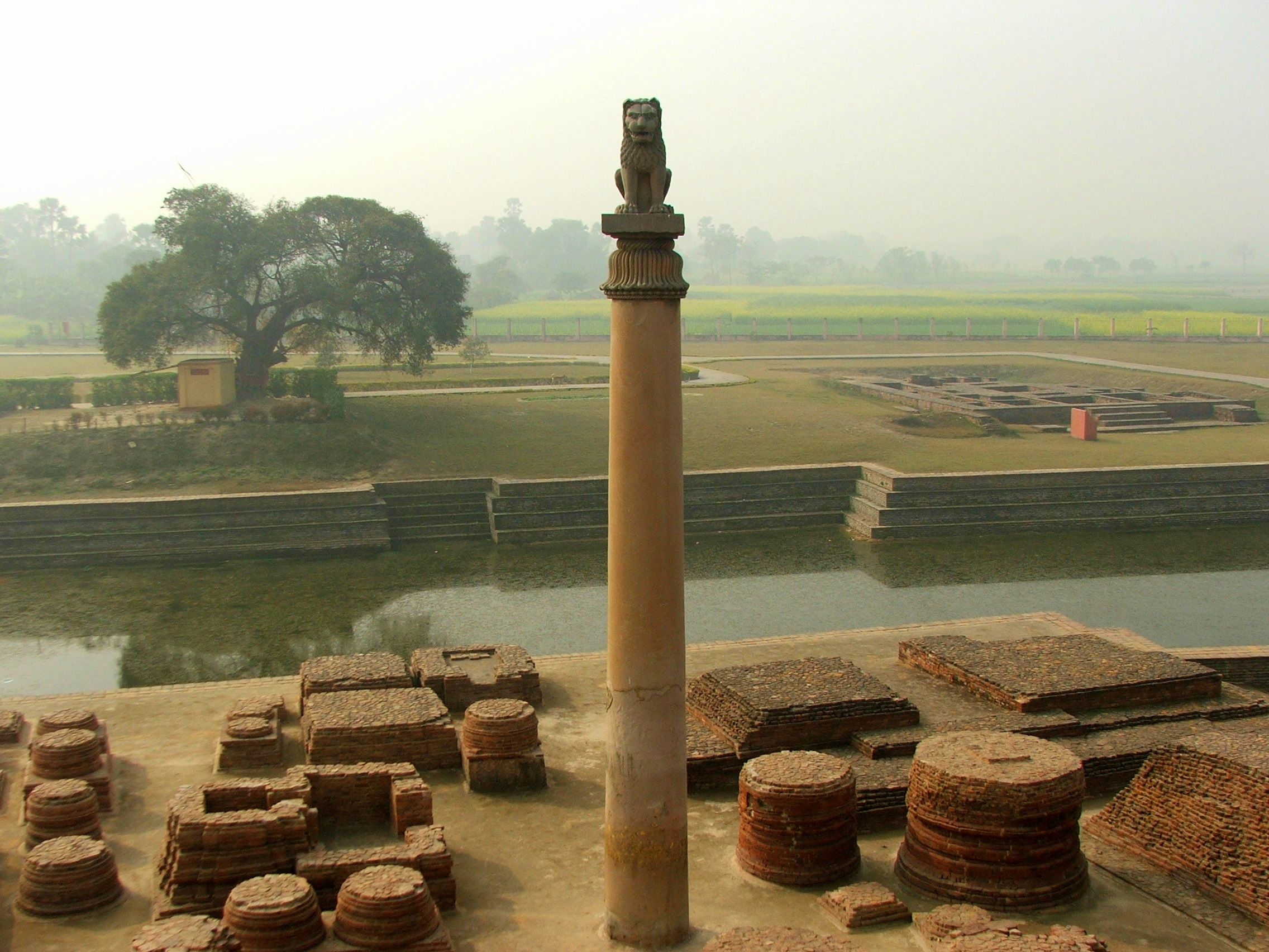 Ashoka pillar at Vaishali, Bihar, India